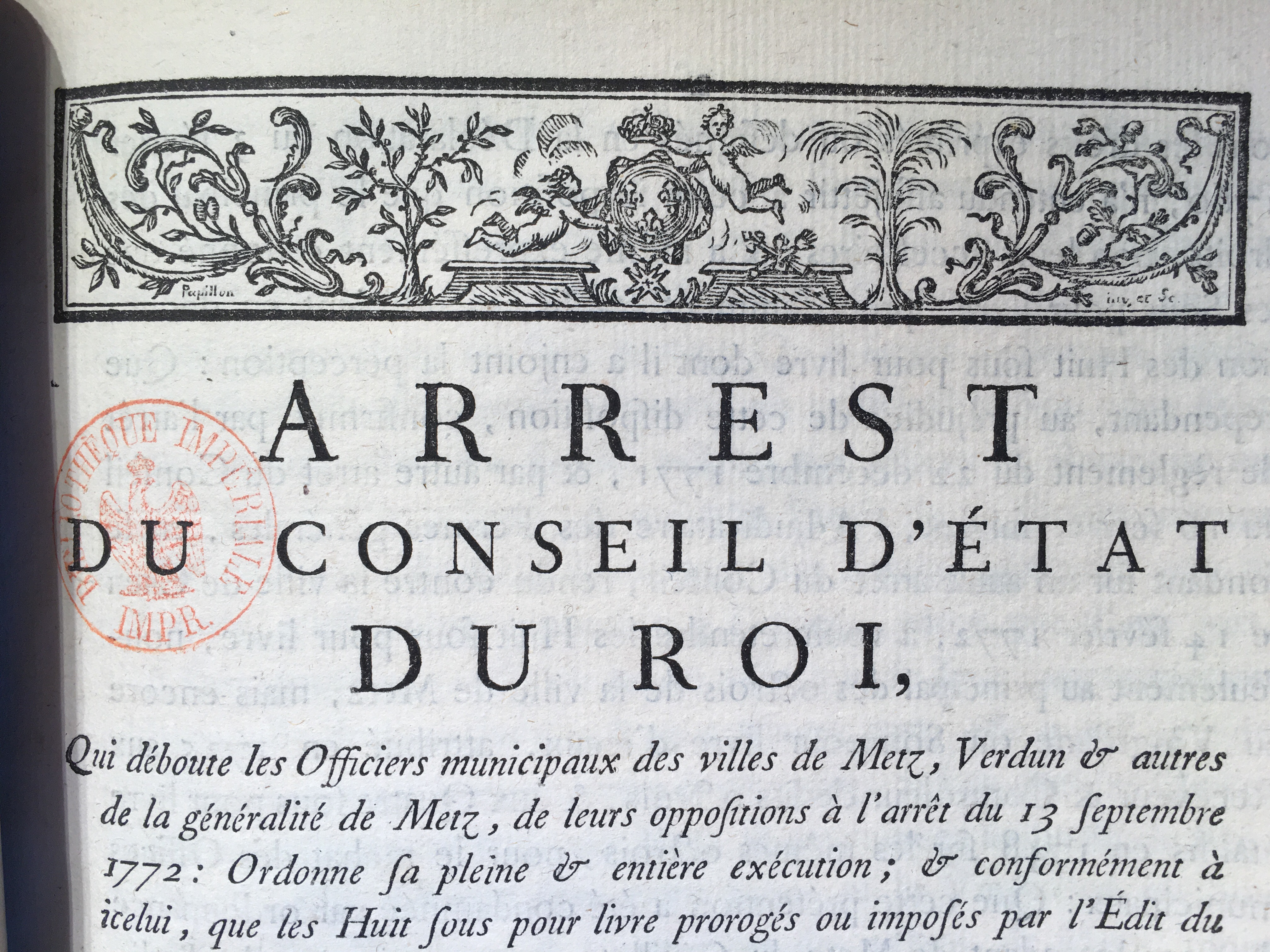 Bandeau Louis XV